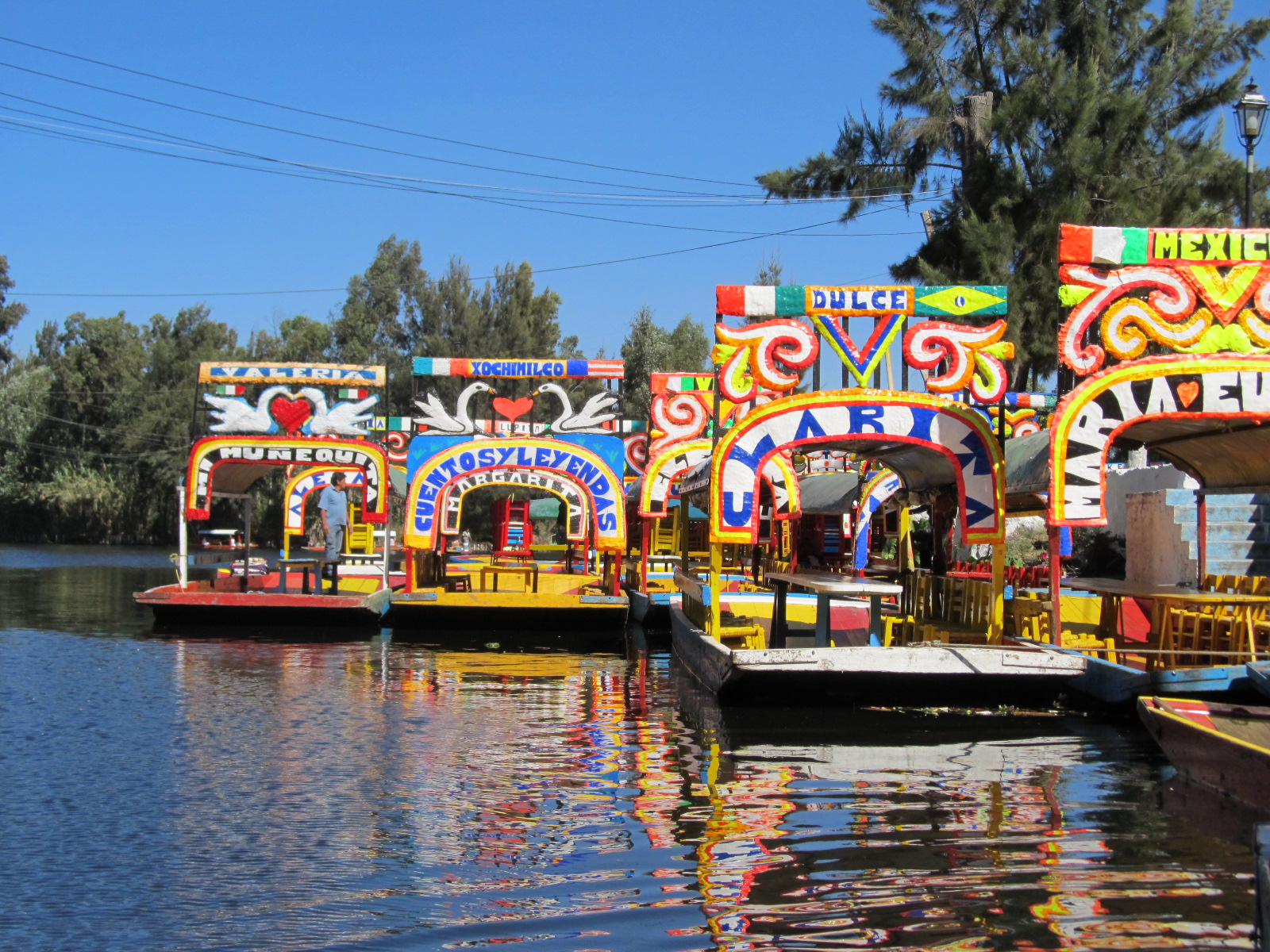 Trajineras, tipica imbarcazione preispanica utilizzata per la semina e il commercio sul lago di Xochimilco a Città del Messico. Attualmente si usa per turisti.